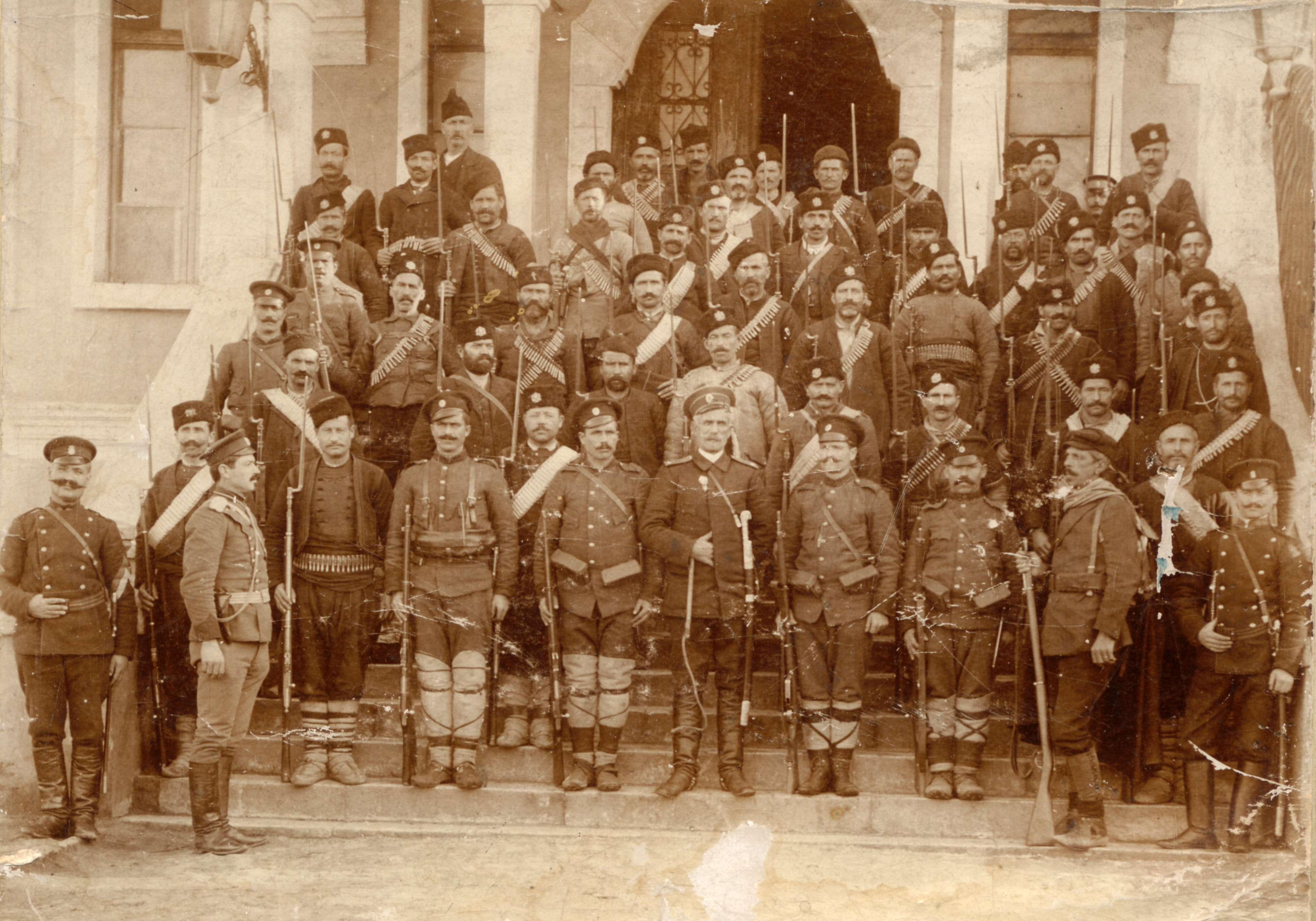 Майор Лазар Нишков с част от дружината на 7 рилска дивизия, ноември 1912 година пред околийското управление в Мехомия